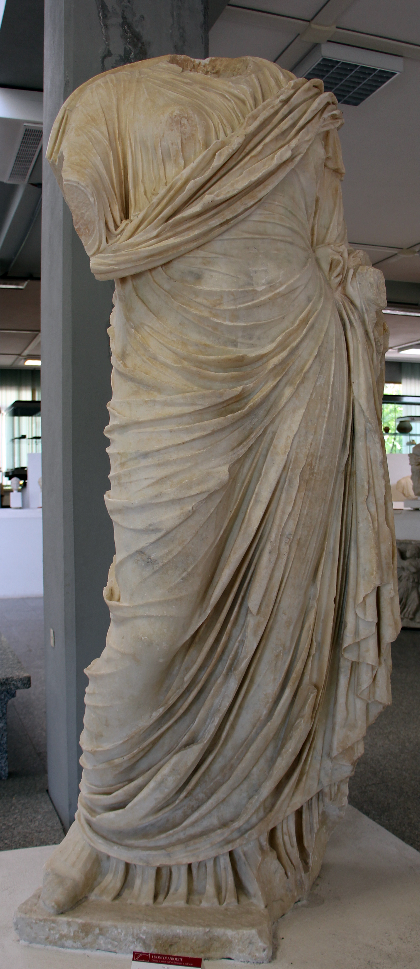 Museo archeologico nazionale G.A. Sanna - MIBAC The making of this document was supported by Wikimedia CH. (Submit your project!) For all the files concerned, please see the category Supported by Wikimedia CH. This is a photo of a monument which is part of cultural heritage of Italy.